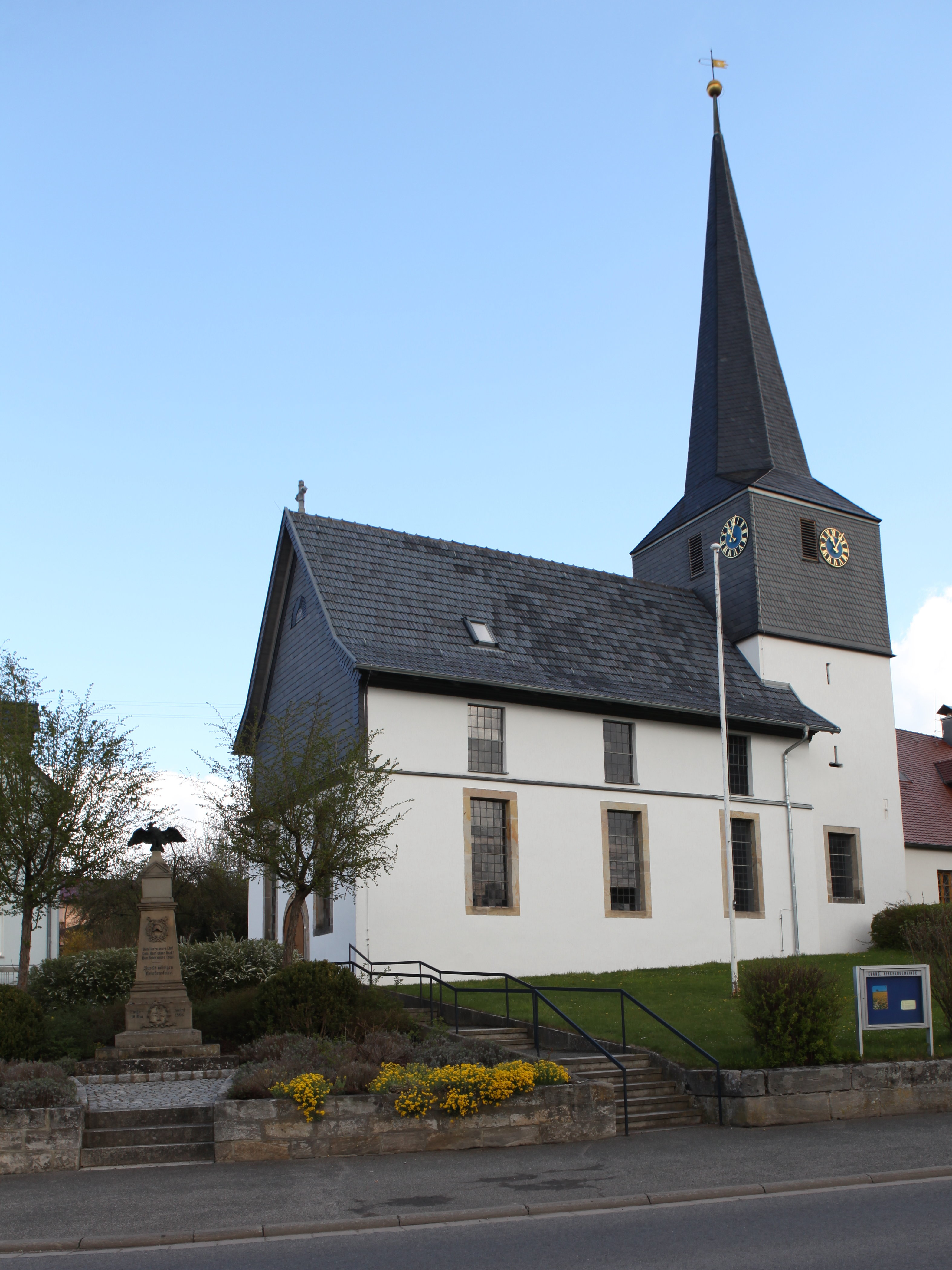 Evangelisch-lutherische Pfarrkirche St. Magdalena in Buch am Forst, OT von Lichtenfels, Oberfranken